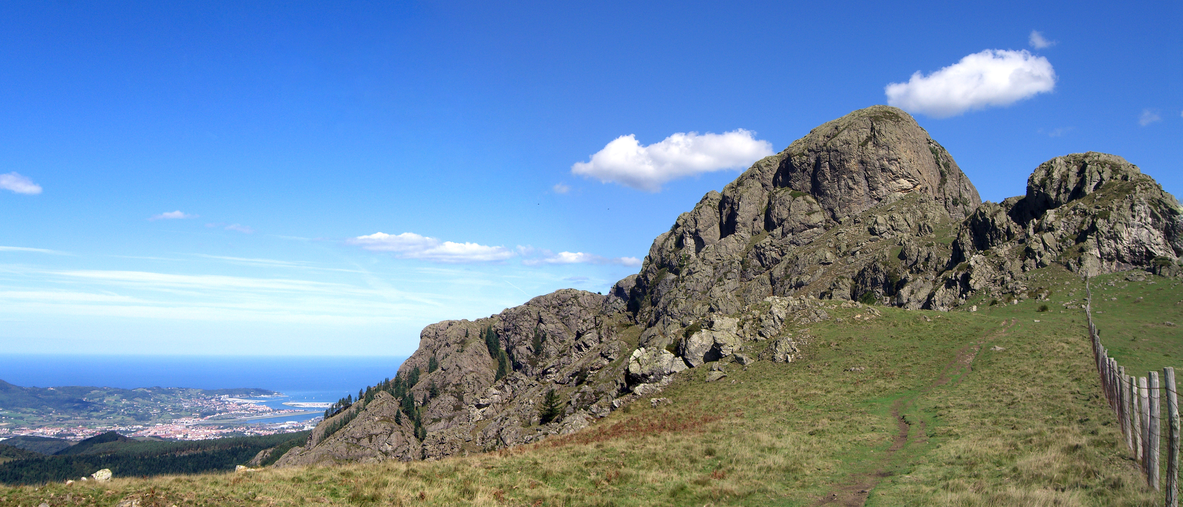 Aiako Harria, Peñas de Aia